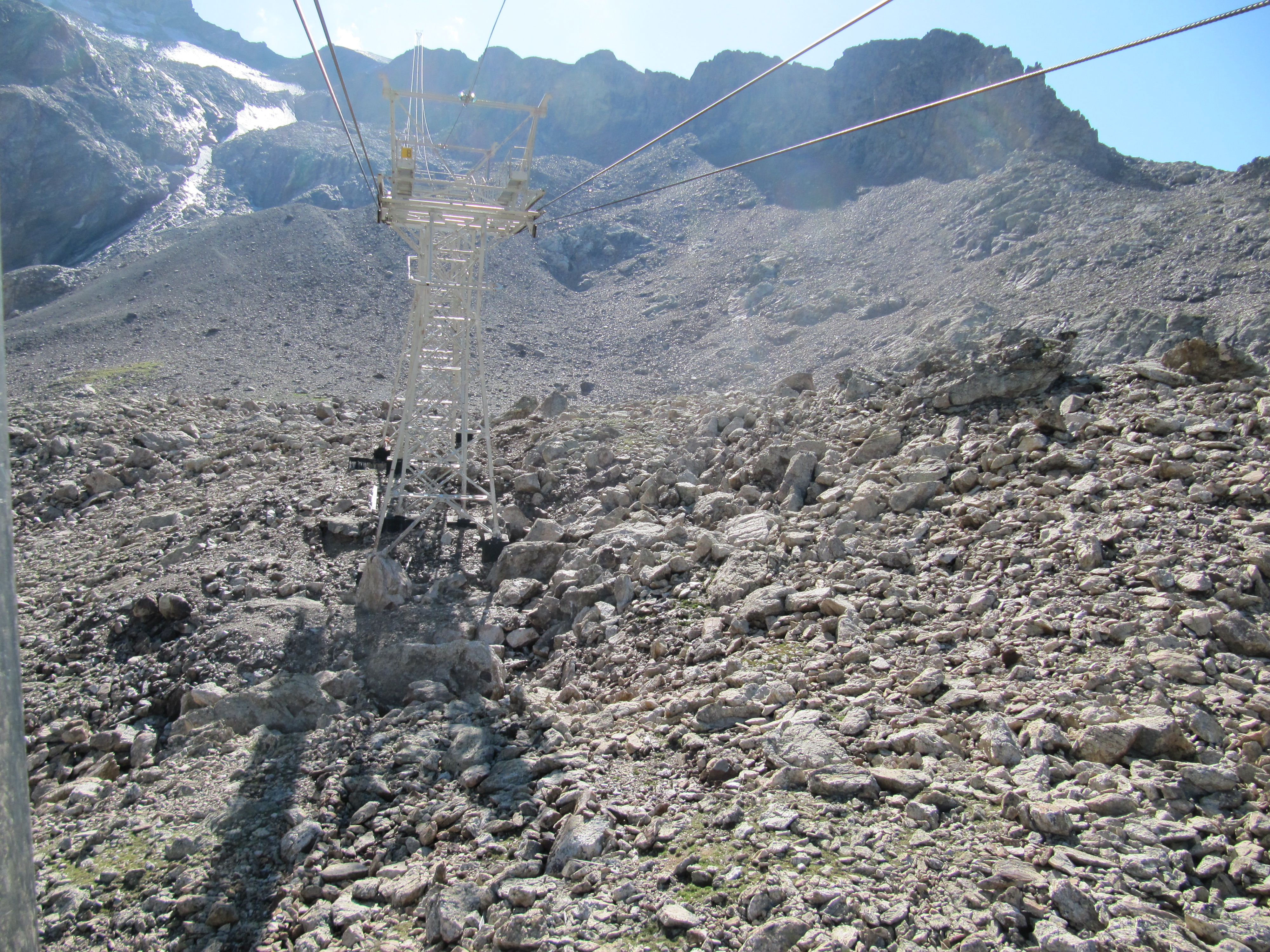 Pylône n°8 de type compression, très rare sur ce type d'appareil